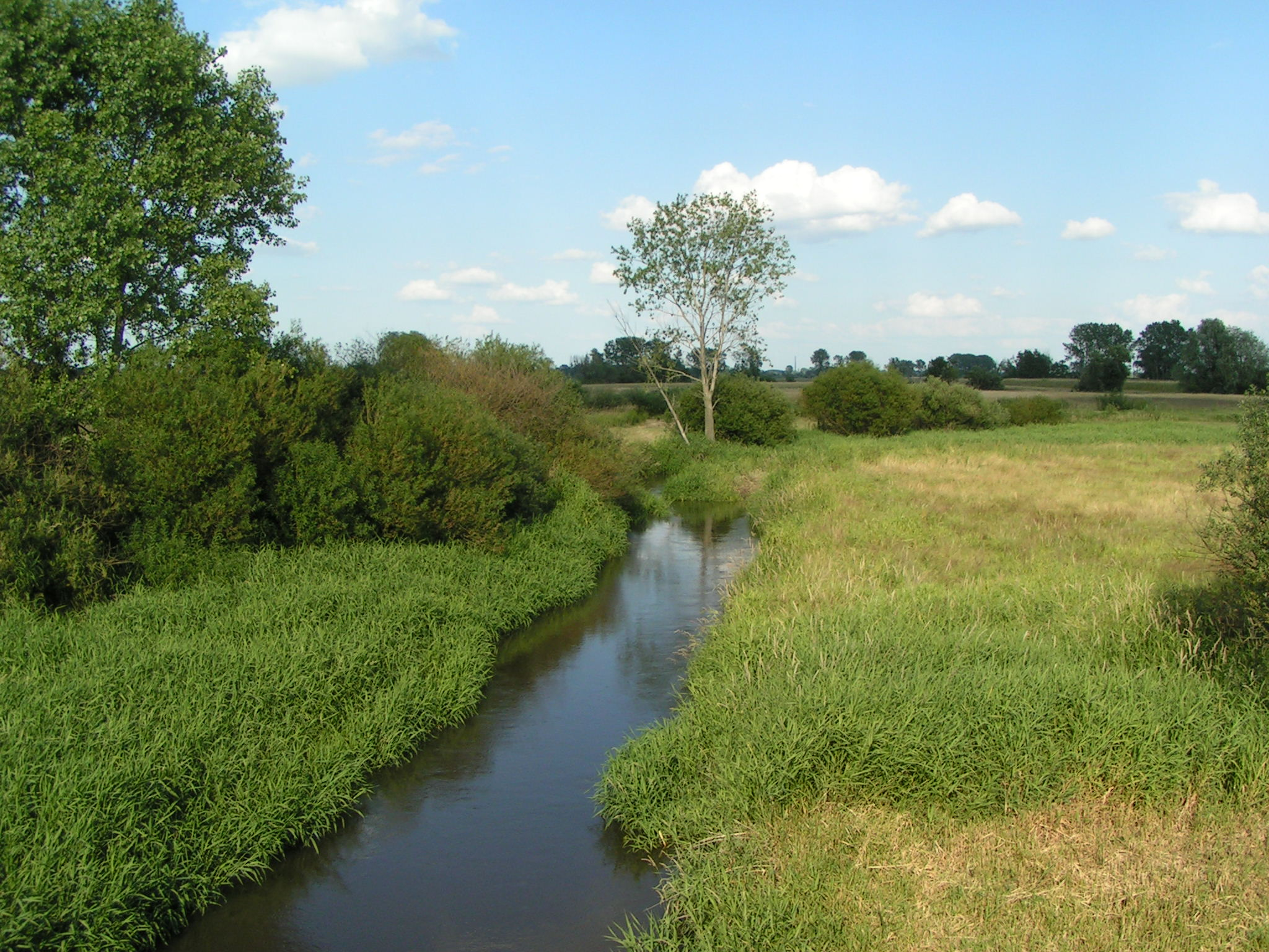 Rzeka Kiełbaska w okolicach Gąsiorowa